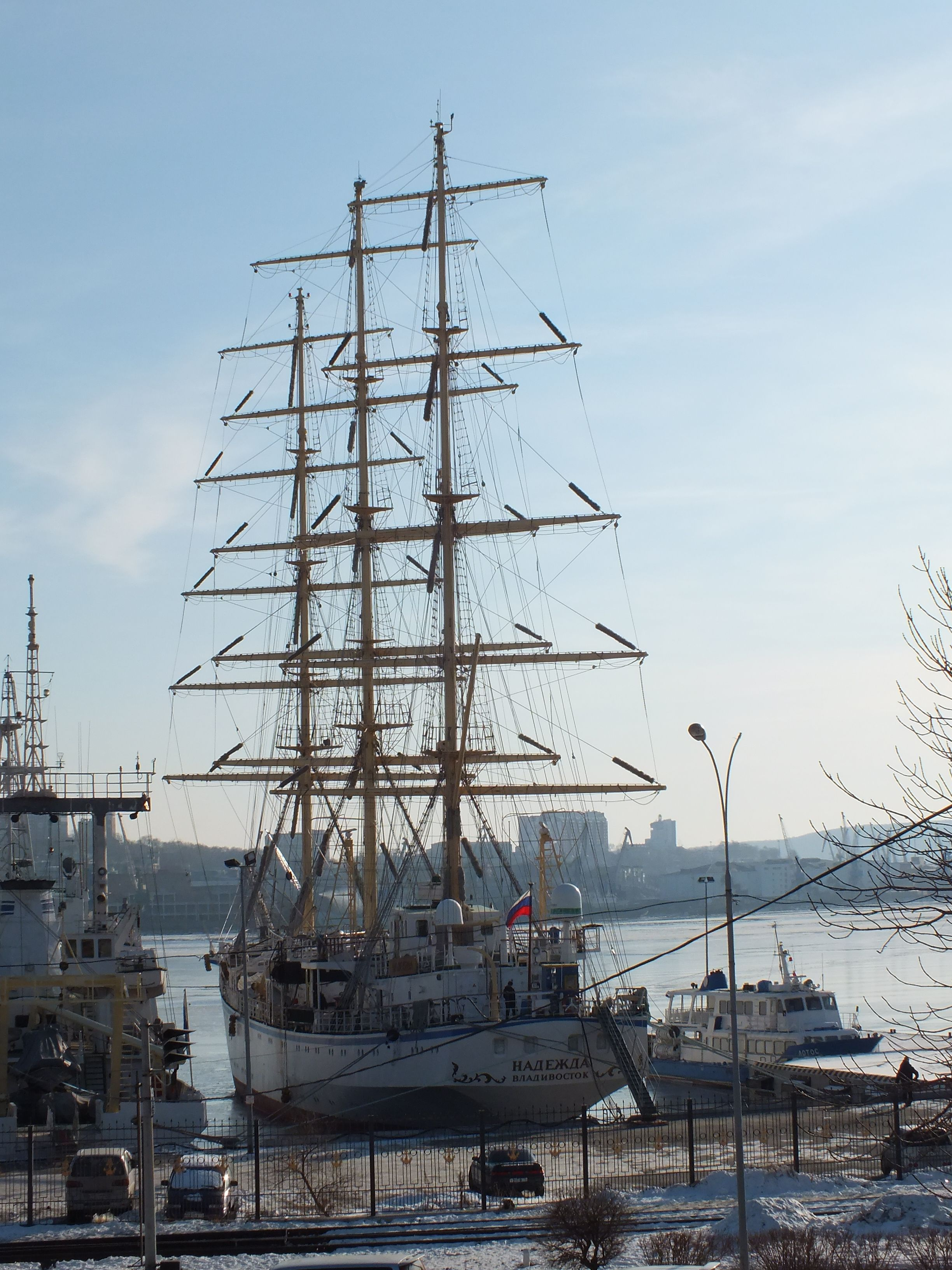 Nadezhda (ship, 1991)